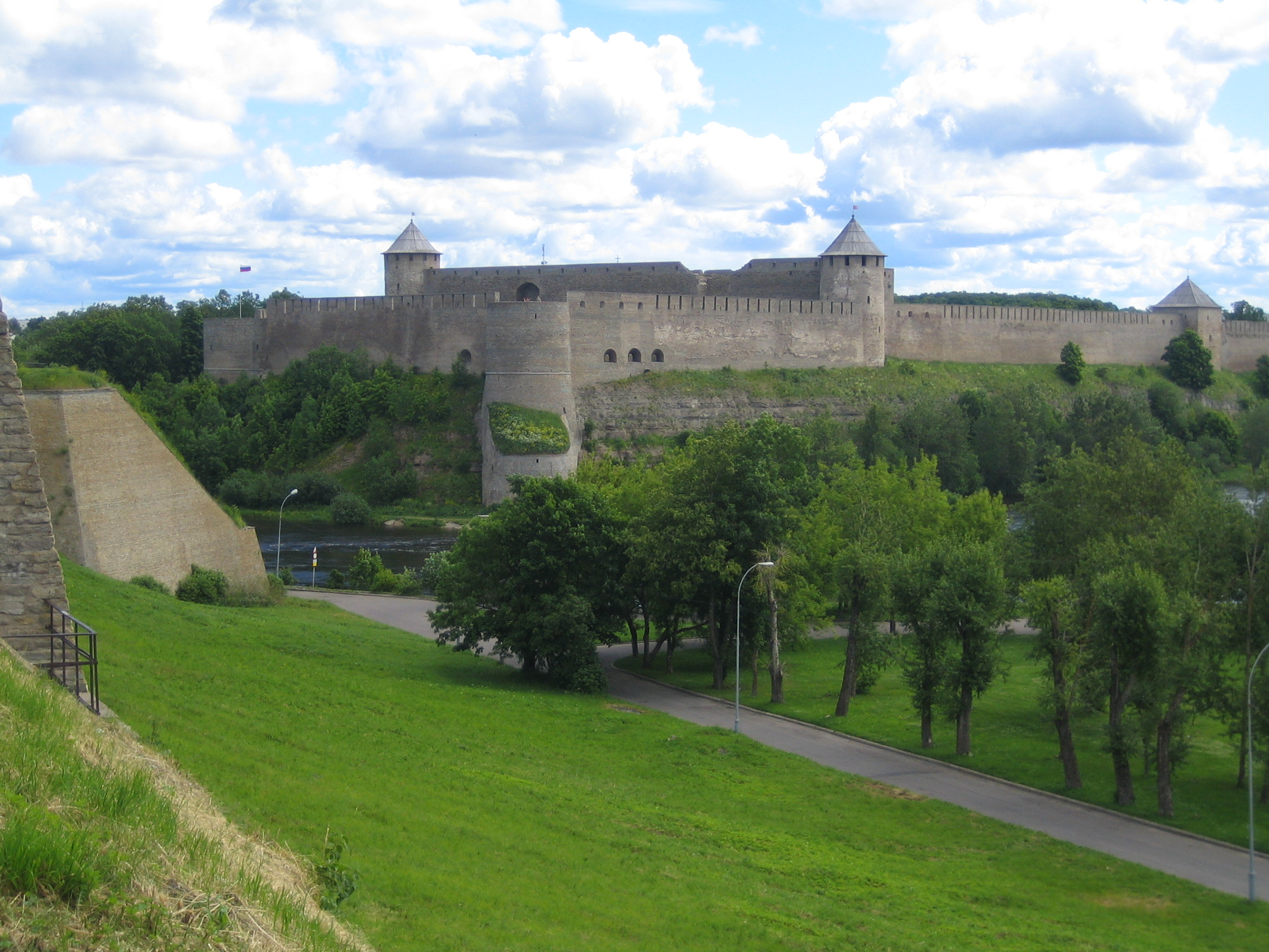 Jaanilinna kindlus